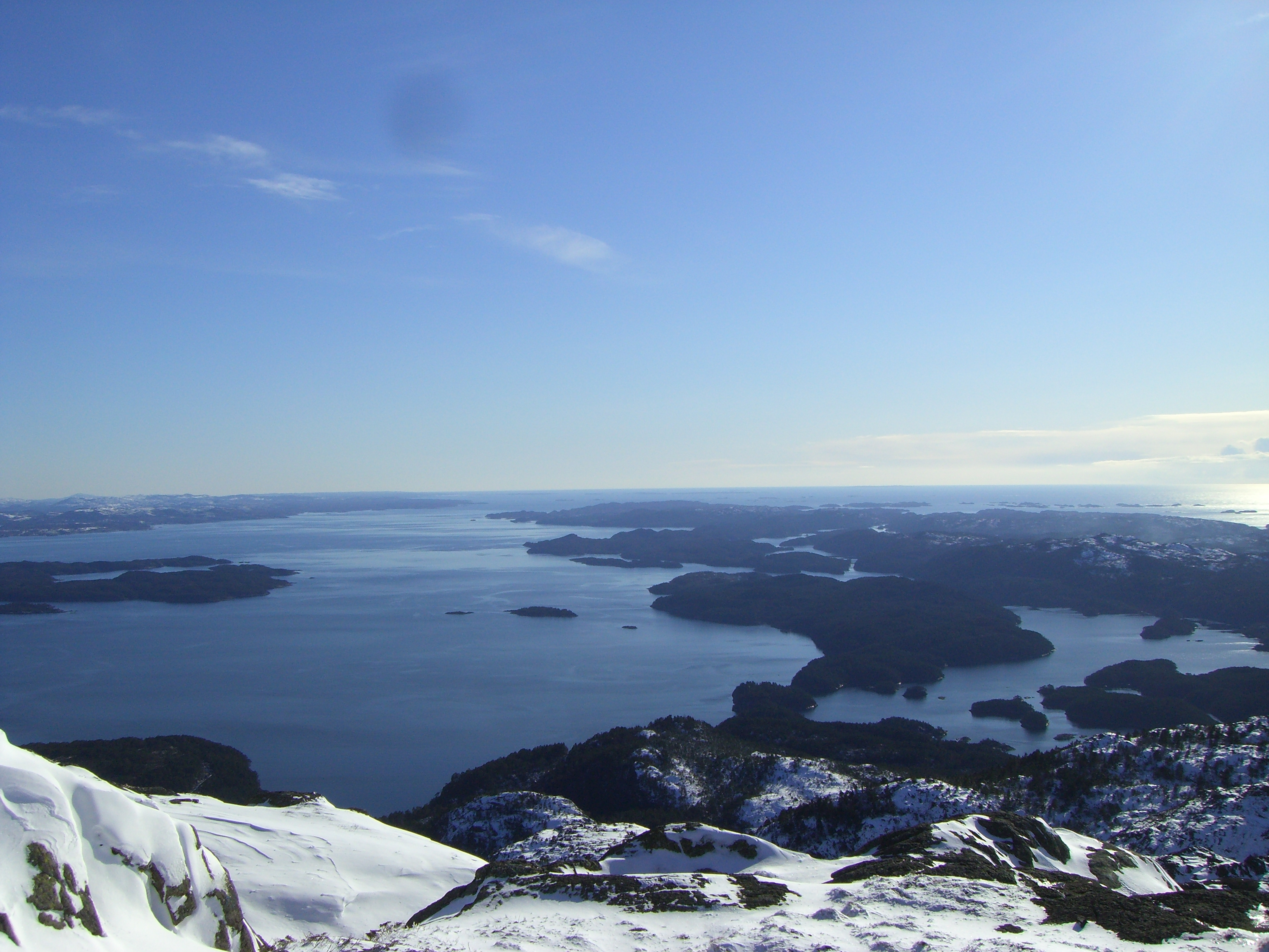 no: Utsikt frå Siggjo